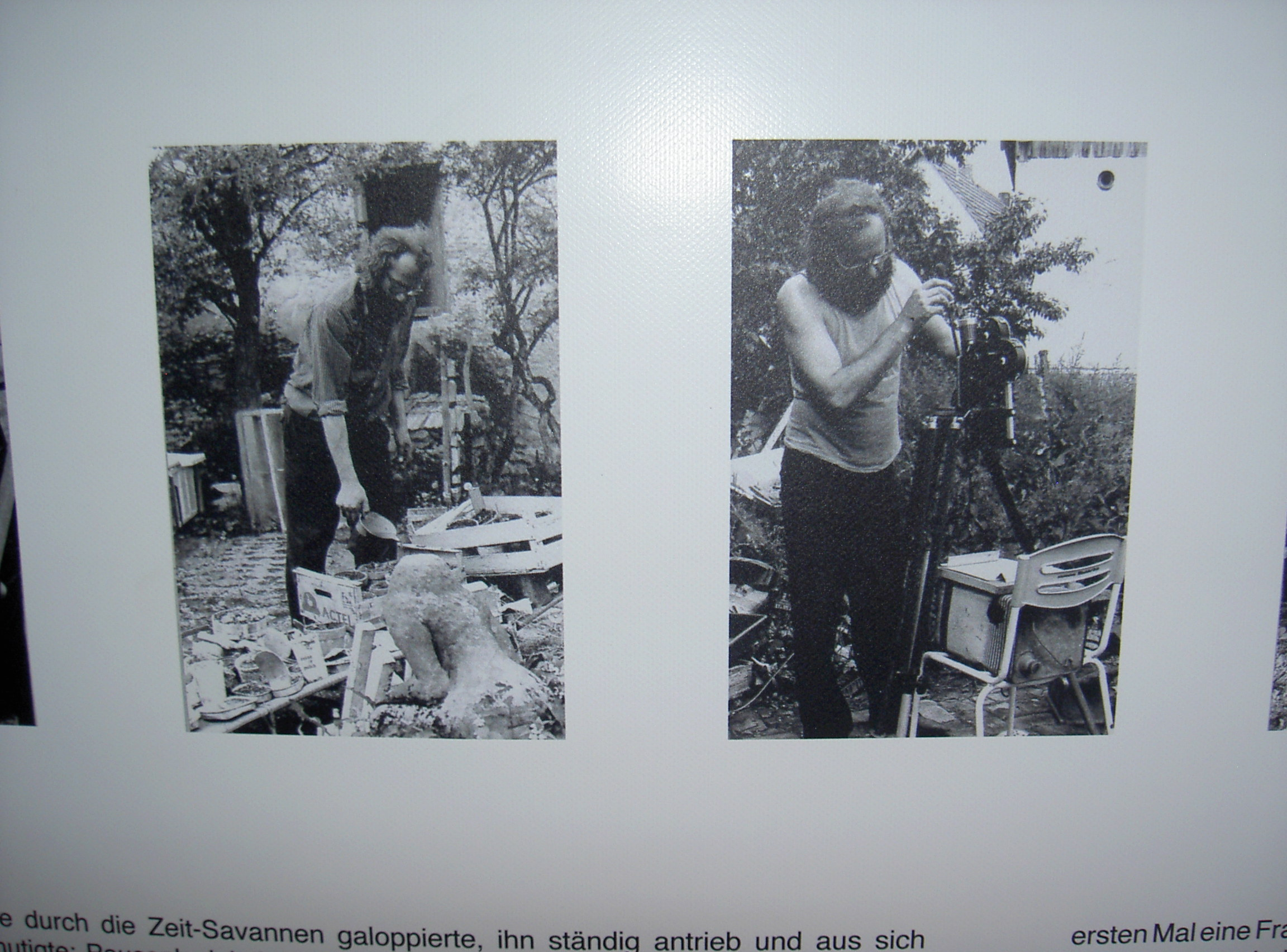 Museum Max Bresele